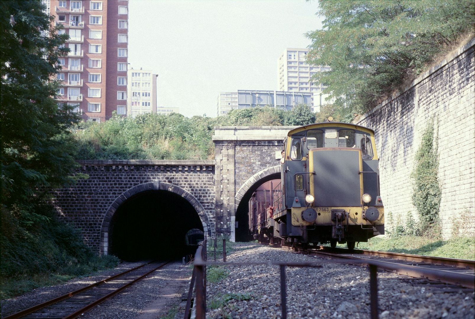 Un train de desserte marchandises débouche du tunnel des Gobelins le 9 août 1985. Sur la gauche la Petite Ceinture Sud en direction de Grenelle.